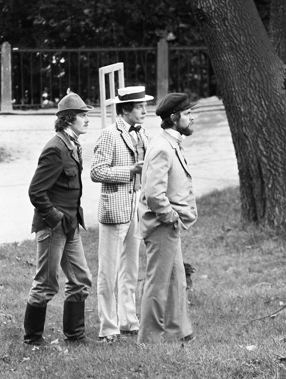 „Suvi“ tegelased Harju mäel. Aare Laanemets - Toots ja Margus Lepa - Kiir 76